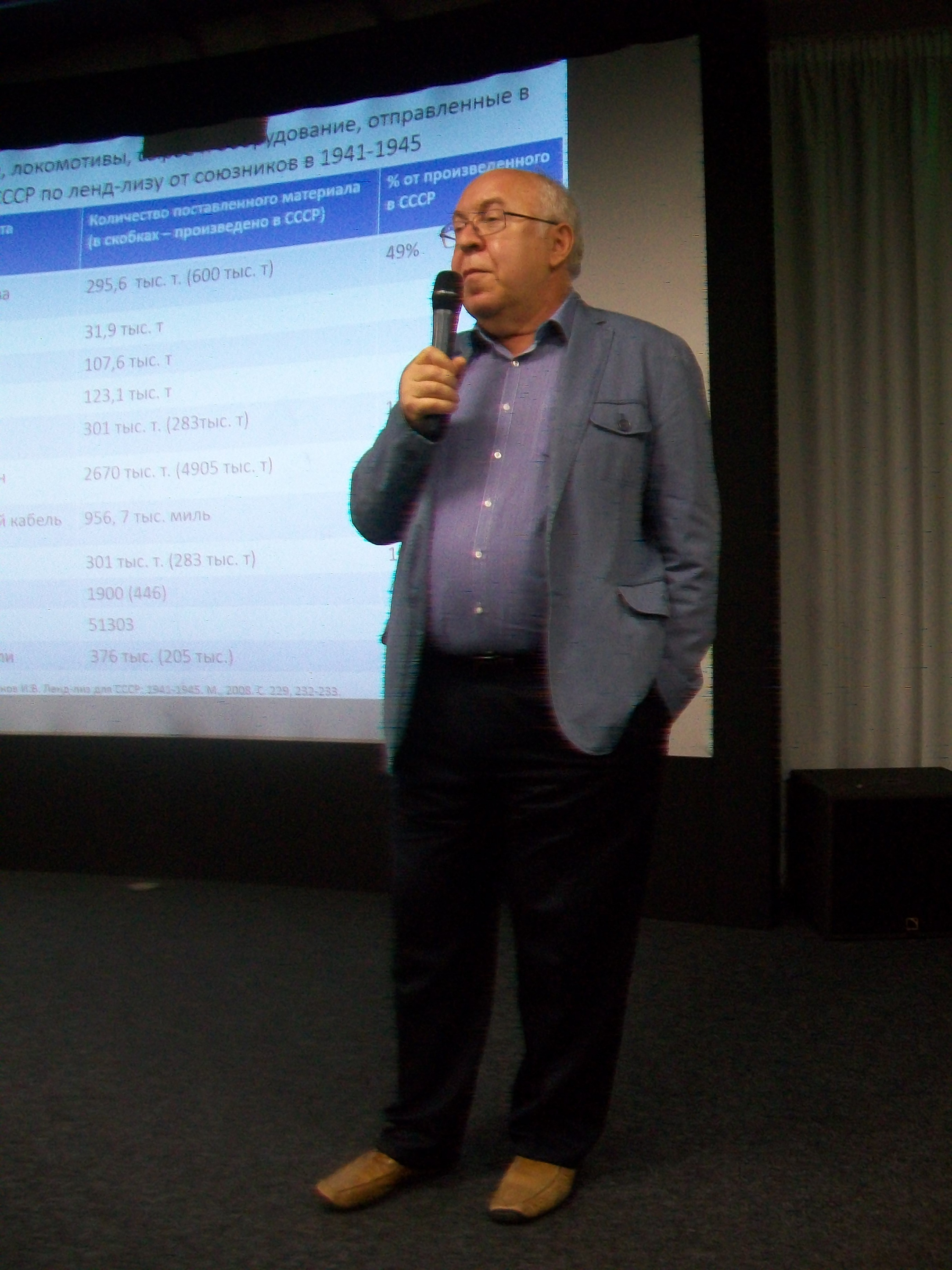 Олег Будницкий в Ельцин-центре. Екатеринбург, 15 сентября 2018 года